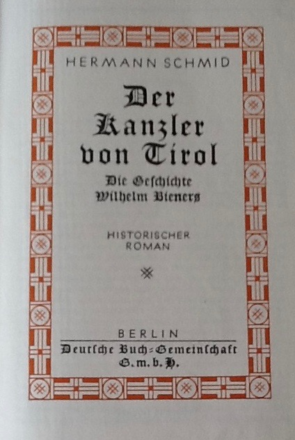 Titelseite des historischen Romans von Hermann von Schmid